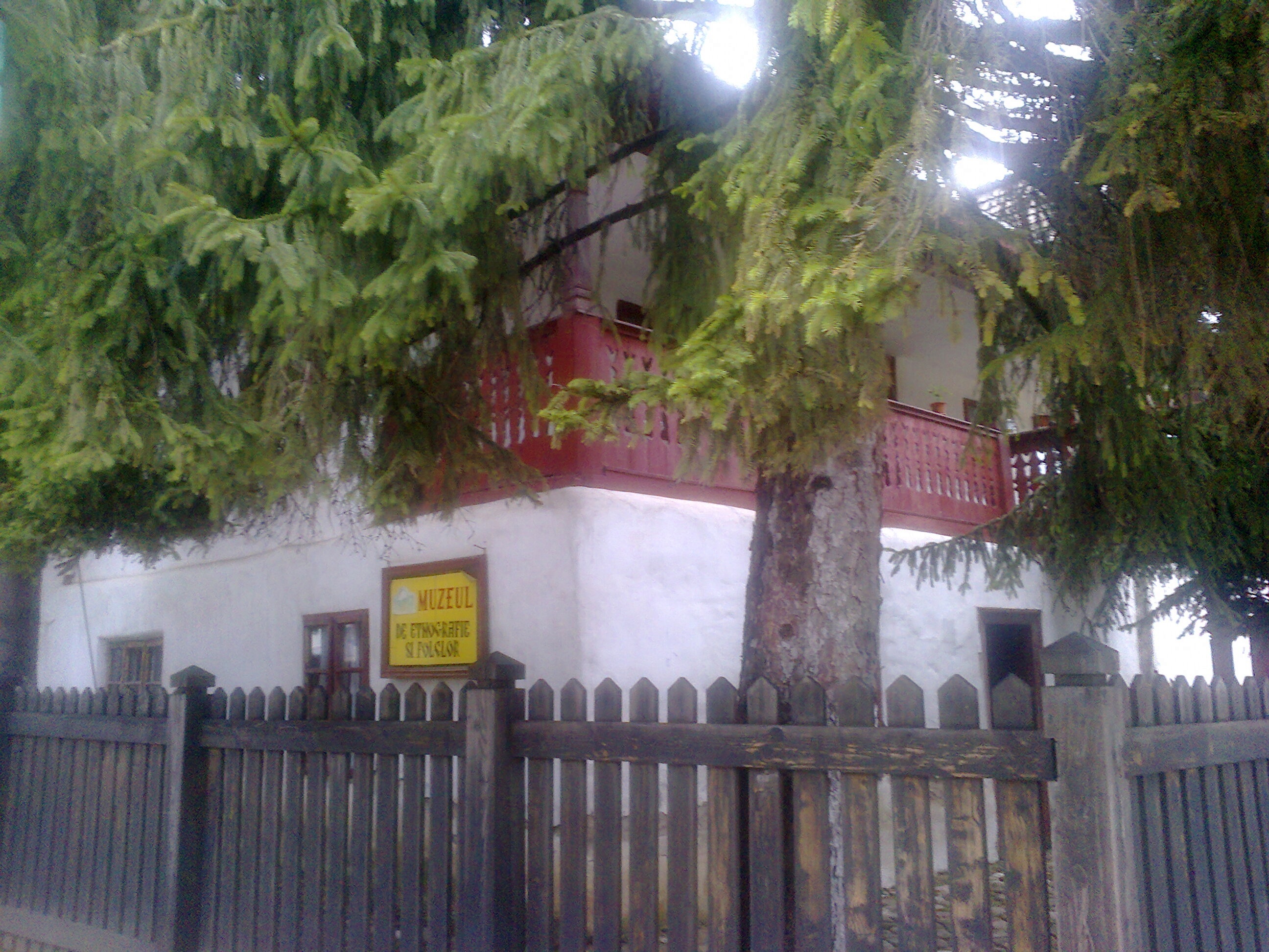 Muzeul de Etnografie si Folclor Pucioasa